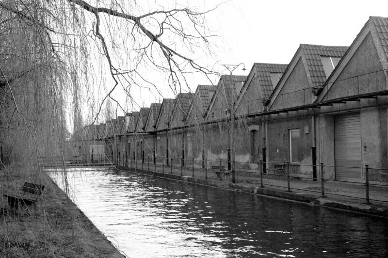 Shedhalle der AKS (Augsburg)